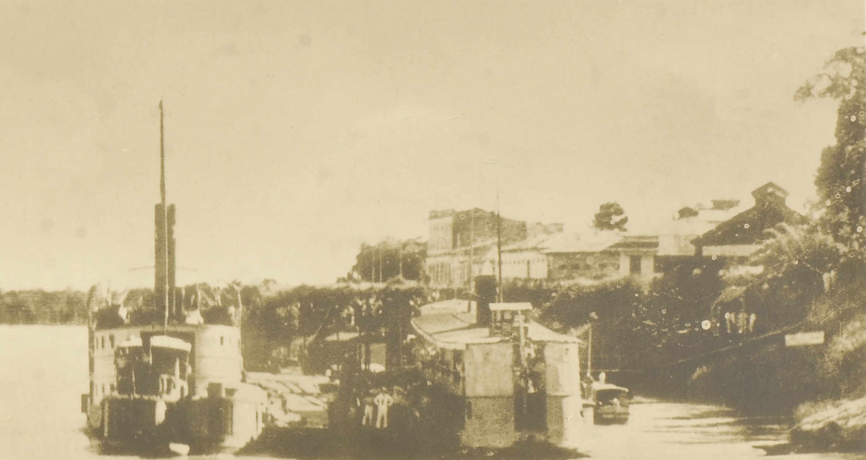 Imagem do Fundo Ministério da Guerra, do Arquivo Nacional